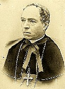 Francica-Nava di Bontifè, Giuseppe (1846-1928)